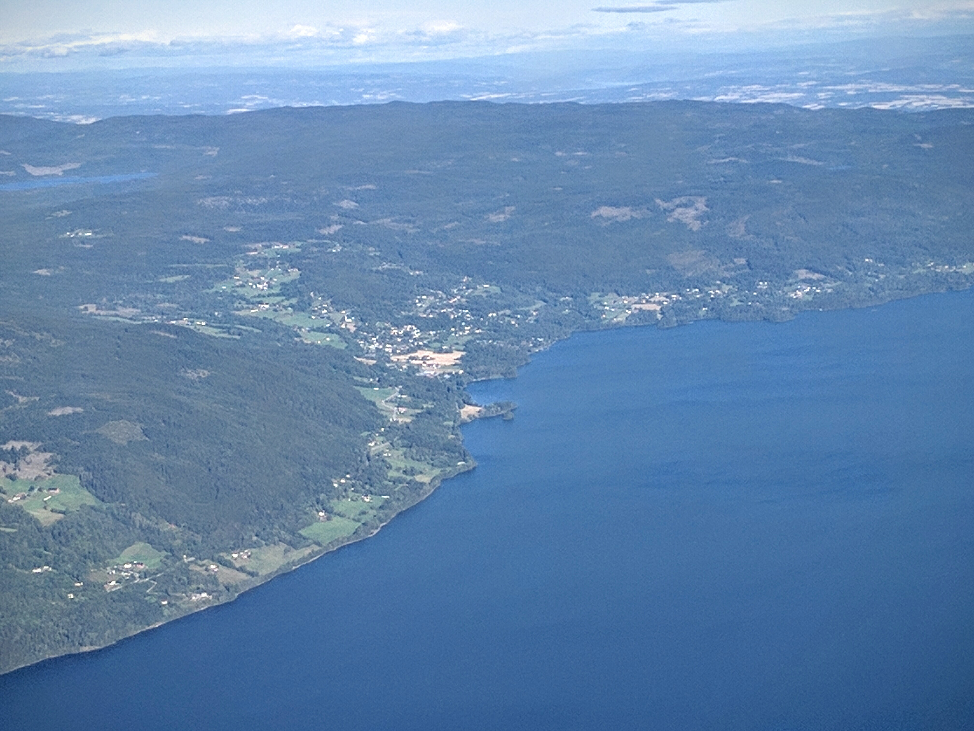 Flyfoto av tettstedet Feiring i Eidsvoll kommune